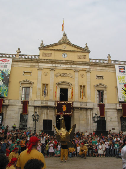 Santa Tecla. Fiesta mayor de Tarragona.